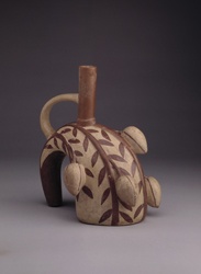 Cerámica Mochica representando tumbo. Museo Larco.